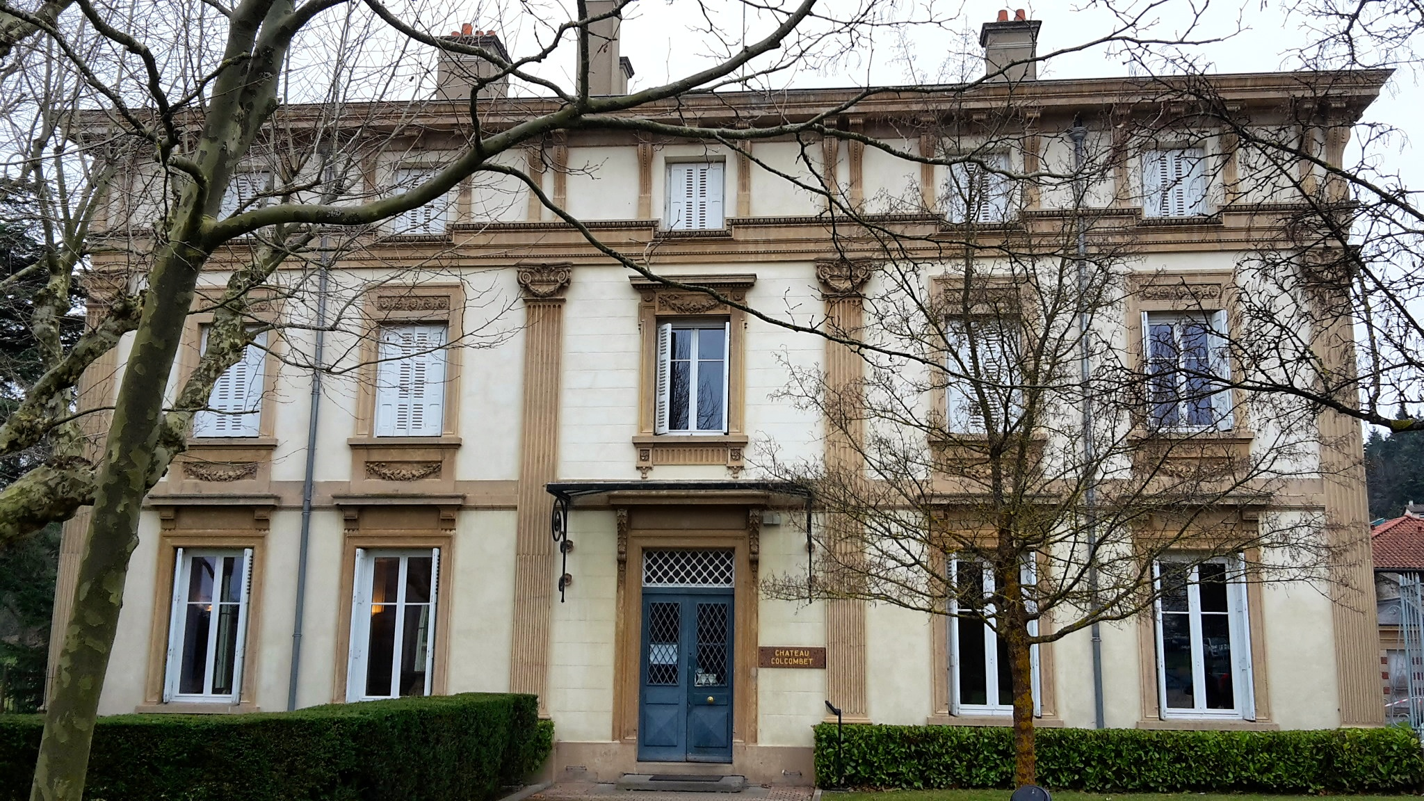 Château Colcombet à Saint-Genest-Lerpt (Loire)